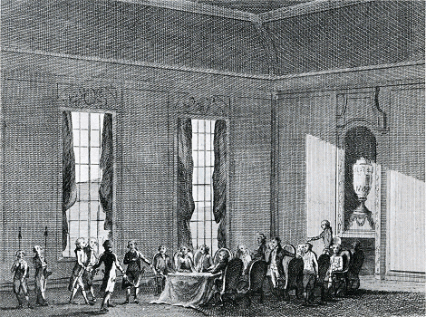 De readmissie van Van der Capellen in de vergadering van ridderschap en steden van Overijsel op 1 november 1782. Anonieme ets. Rijksprentenkabinet, Amsterdam.